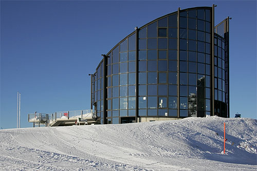 Leysin: Restaurant Tournant Kuklos (La Berneuse)